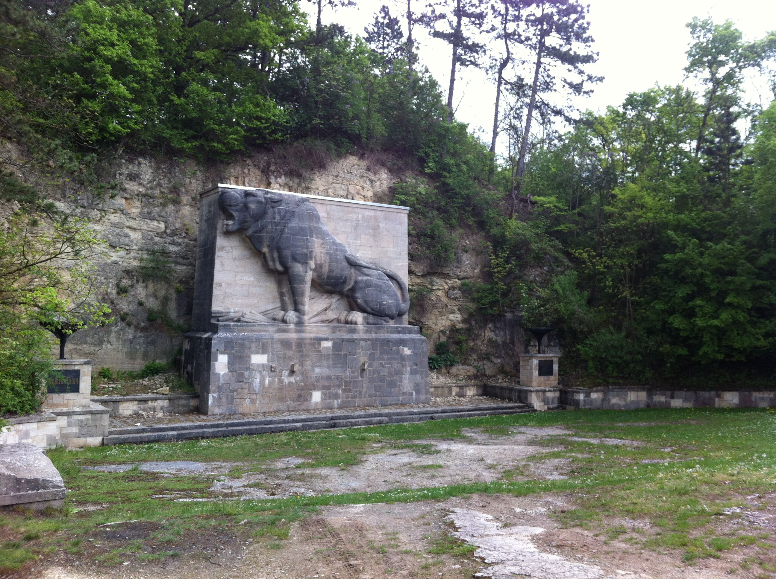 Naturpark Saale-Unstrut-Triasland; „Löwendenkmal“ in Bad Kösen, Gefallenen-Ehrenmal des Kösener S.C.-Verbandes